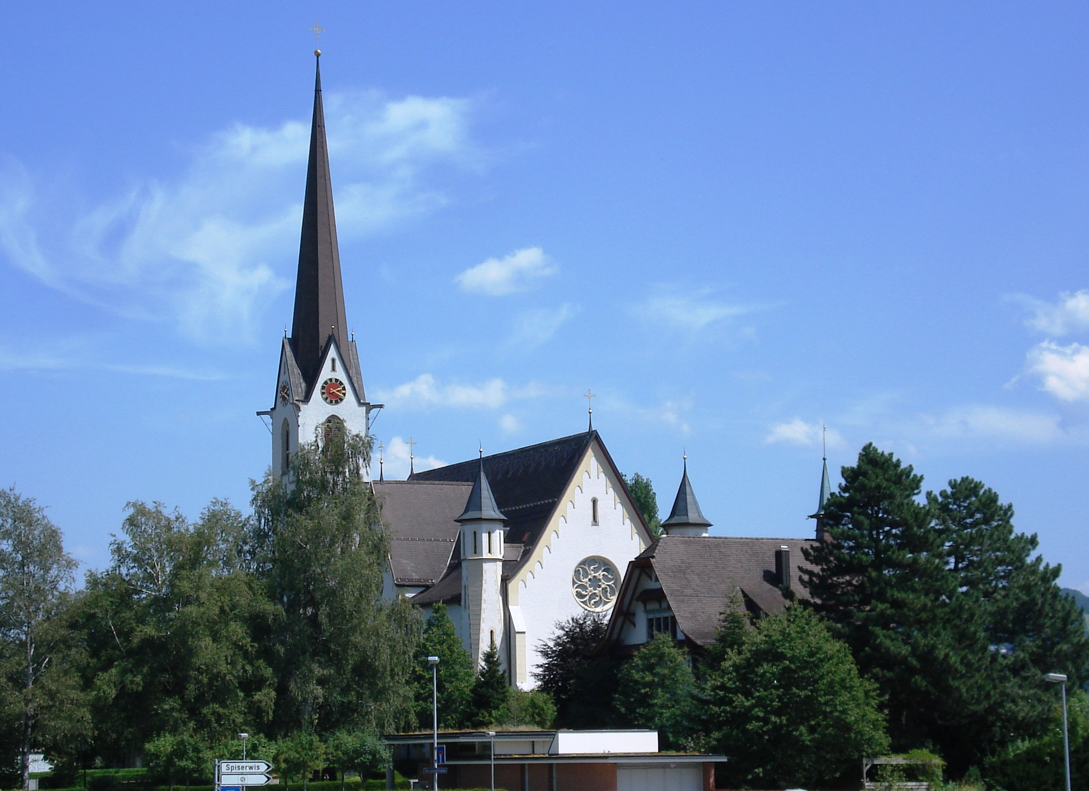 St. Joseph's church, Abtwil, St.Gallen, Switzerland